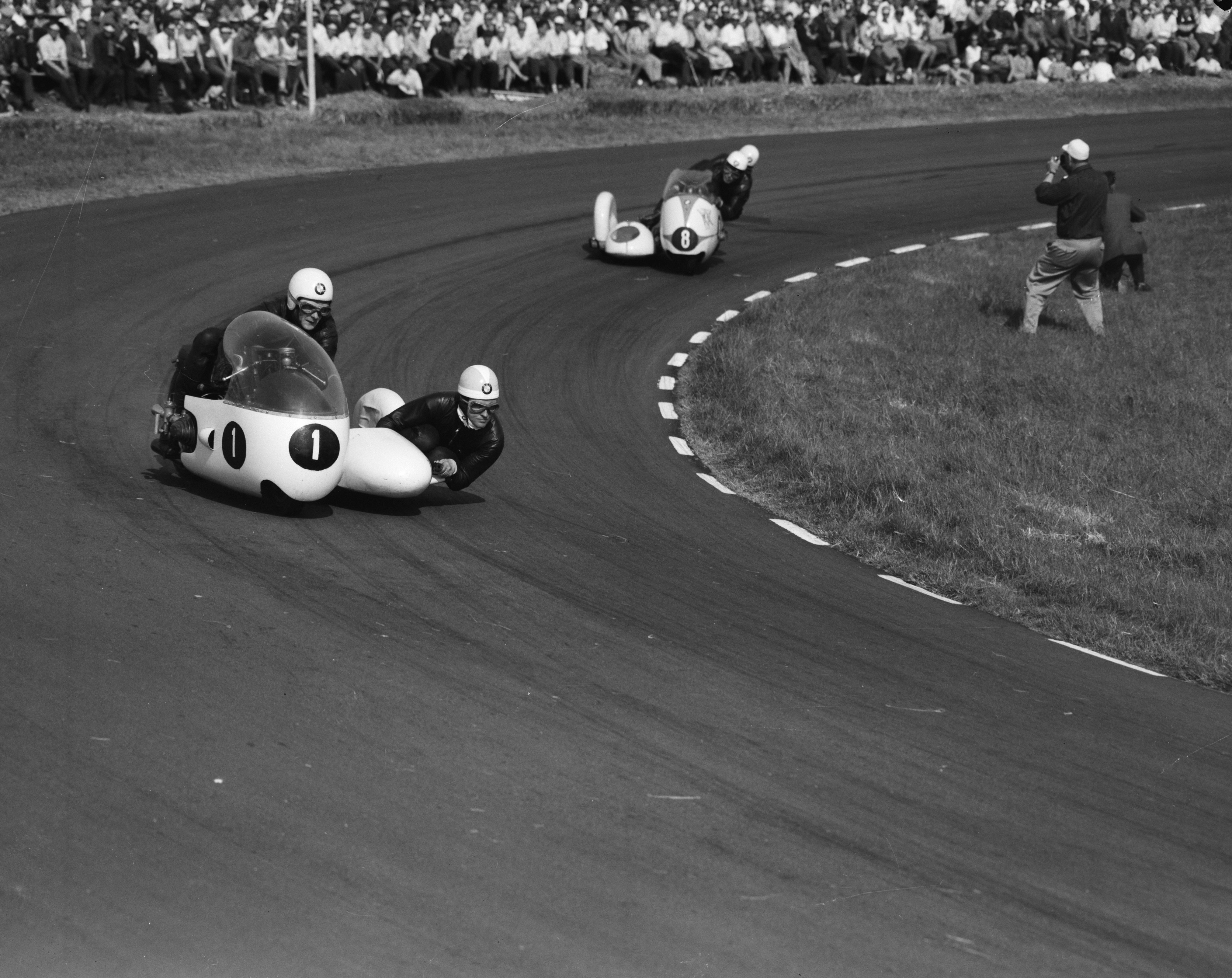 Collectie / Archief : Fotocollectie Anefo Reportage / Serie : TT Assen 1961 Beschrijving : Zijspanrace. Nummer 1 Pip. Harris/ / Ray Campbell (BMW) en nummer 8 Max Deubel / Erst Horner (BMW) Datum : 24 juni 1961 Locatie : Assen Trefwoorden : RACES, motorsport Persoonsnaam : E. Horner Instellingsnaam : TT Fotograaf : Bilsen, Joop van / Anefo Auteursrechthebbende : Nationaal Archief Materiaalsoort : Negatief (zwart/wit) Nummer archiefinventaris : bekijk toegang 2.24.01.04 Bestanddeelnummer : 912-6404